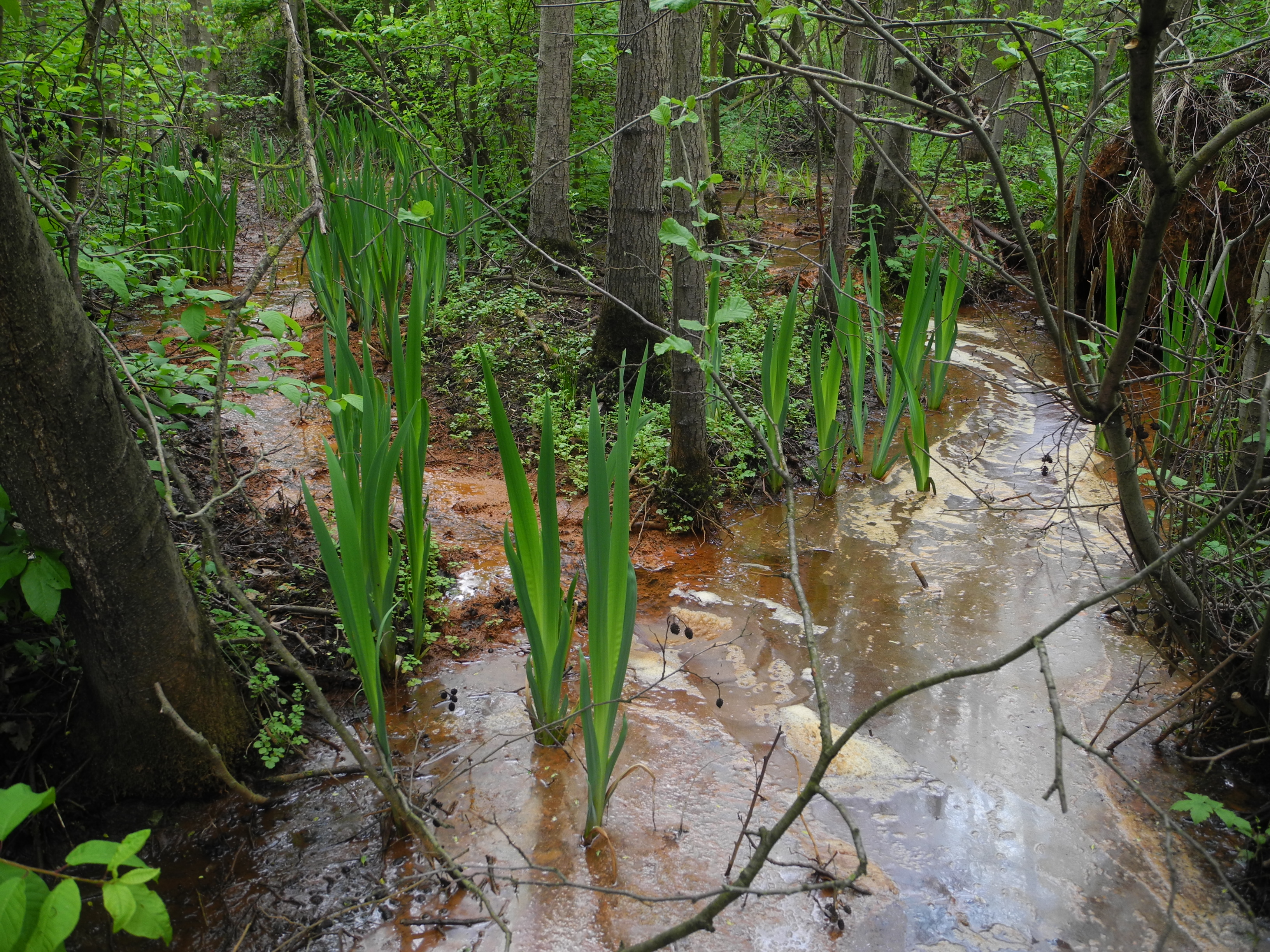 Flächenhaftes Naturdenkmal im Landkreis Kassel 6.33.241. "Feuchtgebiet Die Bruchwiesen im Rohrbach" bei Ihringshausen bzw. Simmershausen.